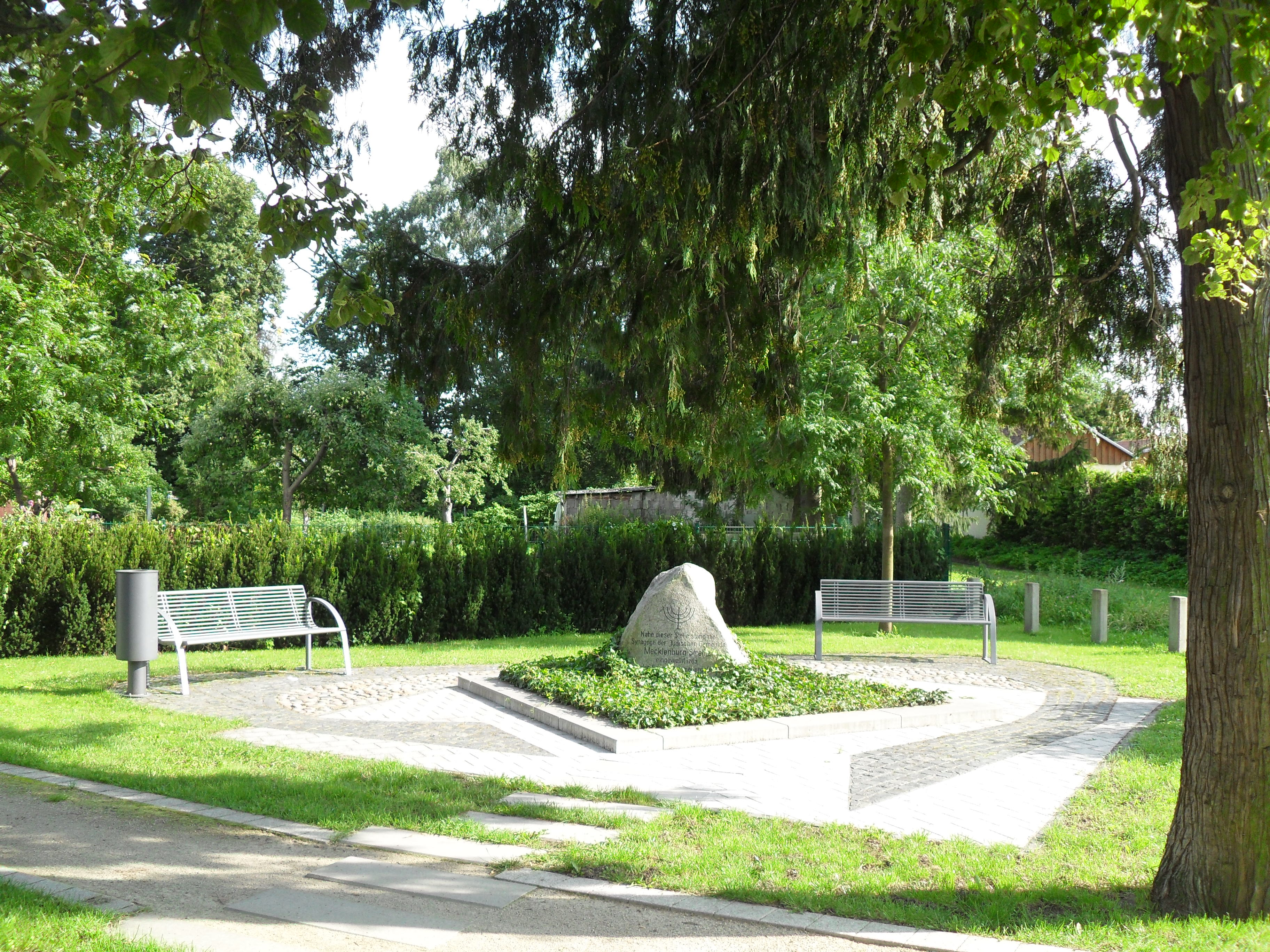 Gedächnisstätte zur Erinnerung an die in der Reichsprogromnacht am 10. November 1938 zerstörte Synagoge von Strelitz-Alt